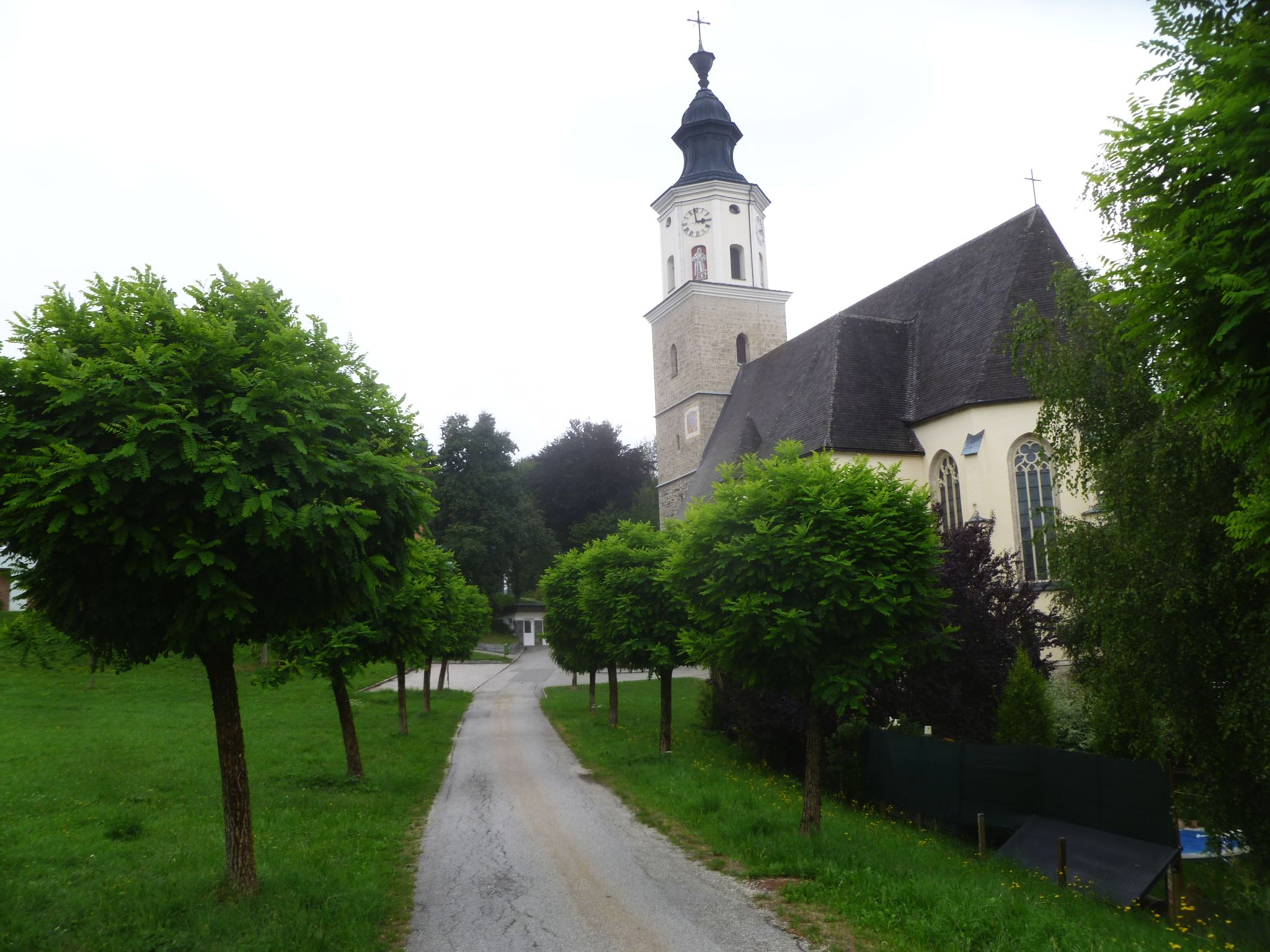 Kath. Pfarrkirche hll. Simon u. Judas